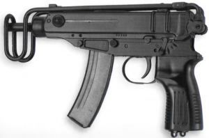 je to obyčajna fotka zbrane